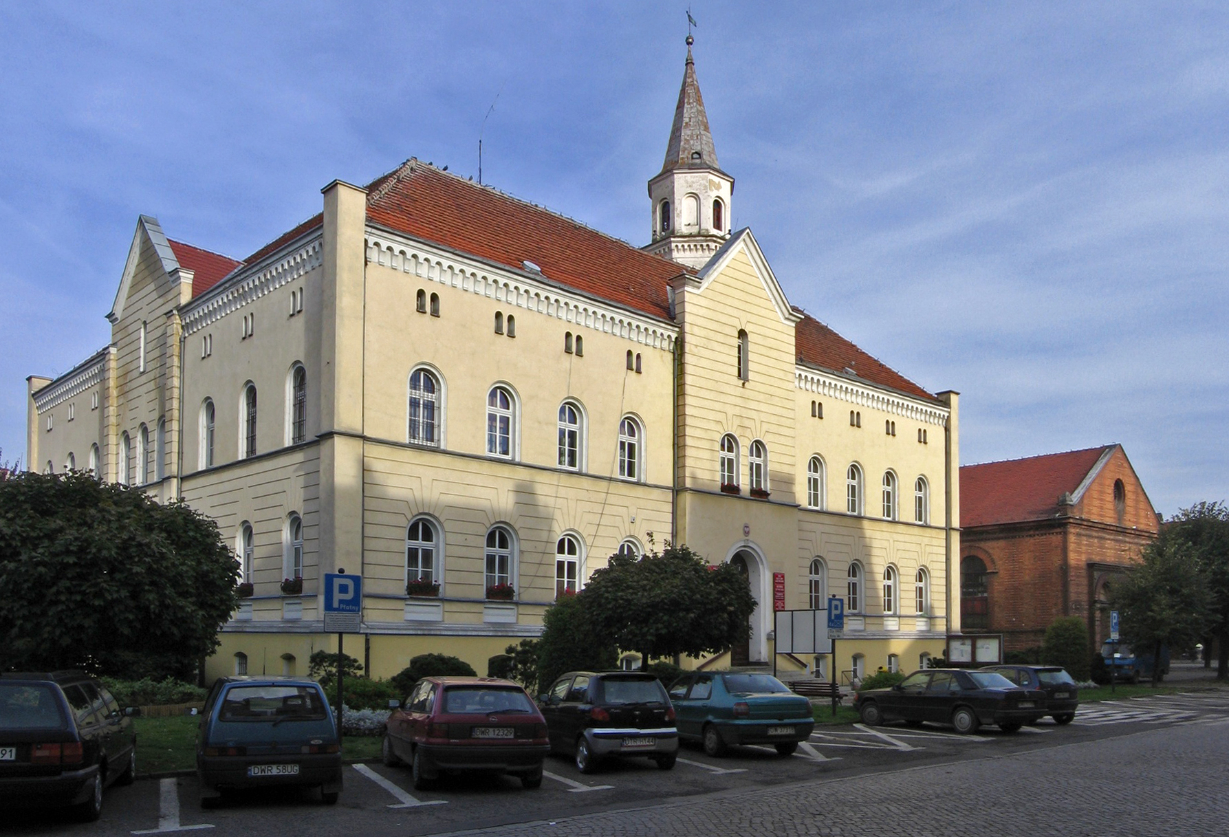 Kąty Wrocławskie - ratusz (zabytek nr A/3822/1792 z dn. 1966-08-21)